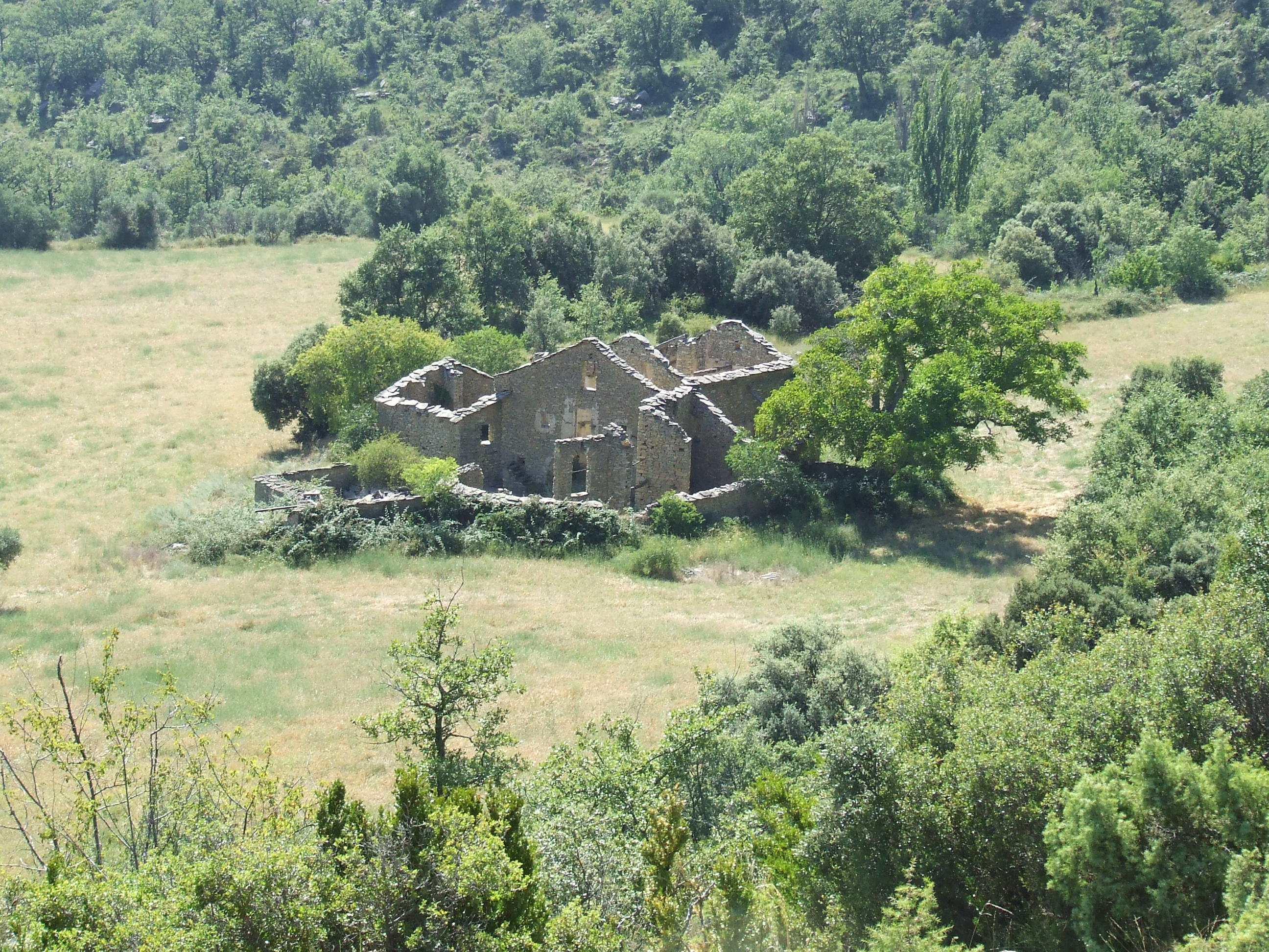 Mas de Condó (el Meüll, Mur, Castell de Mur, Pallars Jussà)